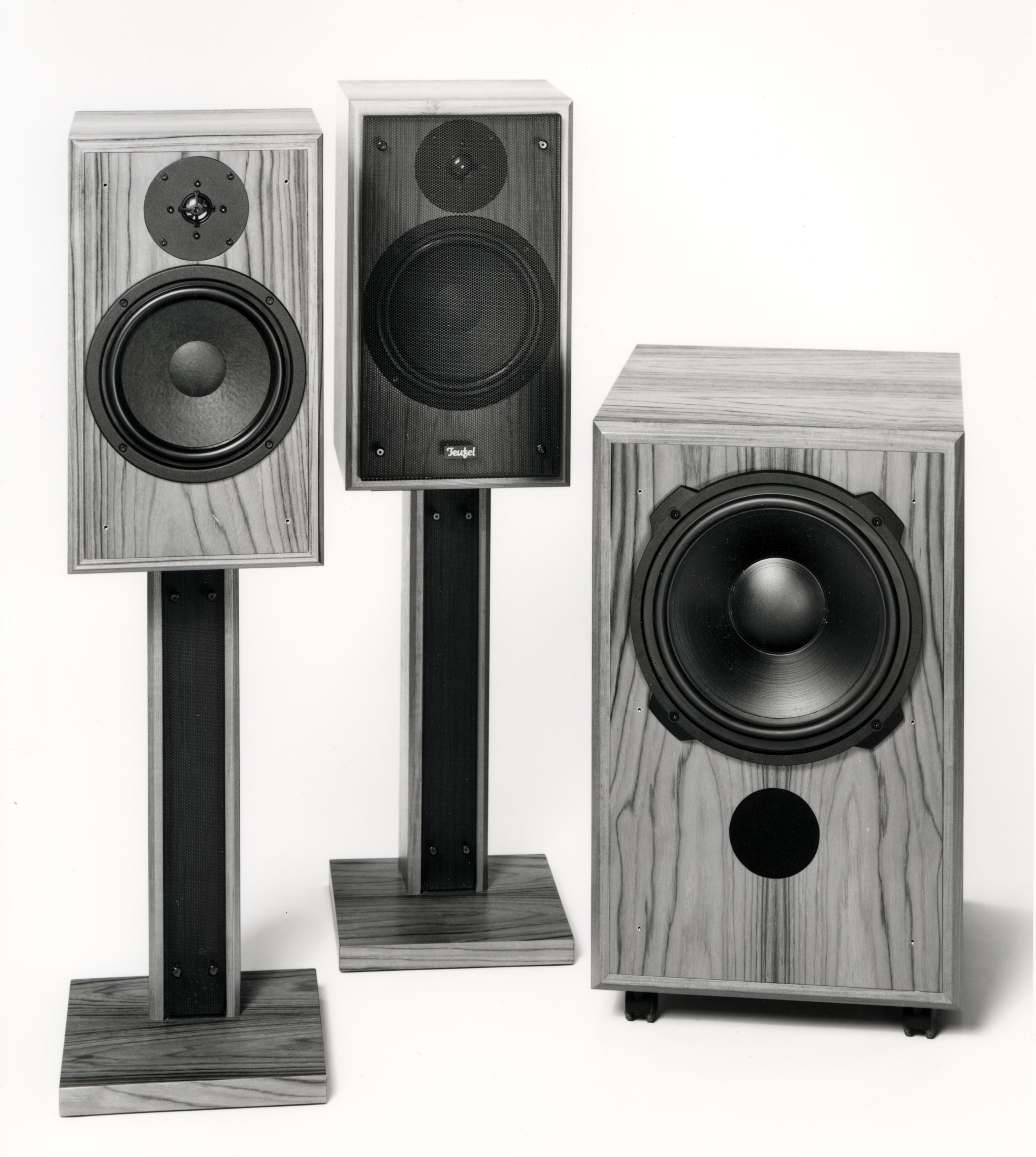 2.1-Lautsprecherset Teufel M200 mit Subwoofer M6000